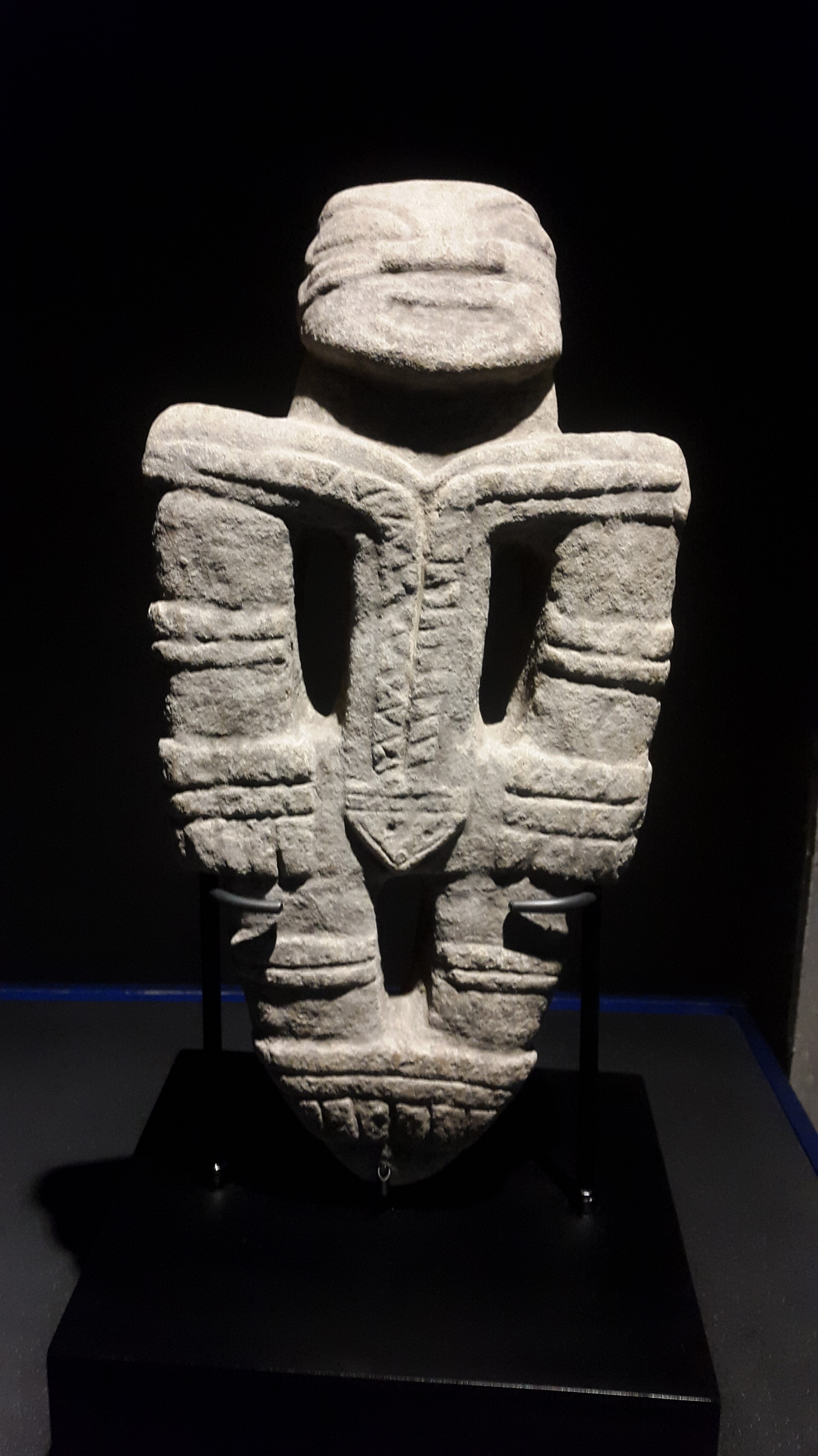 Estatua antropomorfa de andesita, de la cultura del Diquís, Costa Rica. Representa un chamán con máscara de jaguar.